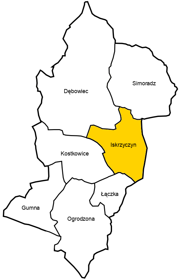 Sołectwo Iskrzyczyn na mapie gminy